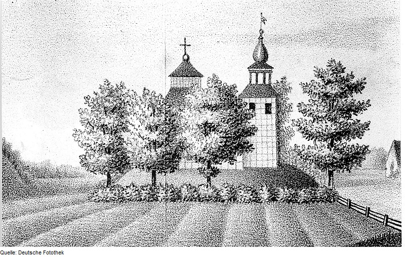 Original image description from the Deutsche Fotothek Krauschwitz-Podrosche. Grenzkirche, Lithographie, aus: Buttkowsky-Chronik (RA Görlitz Görlitz)